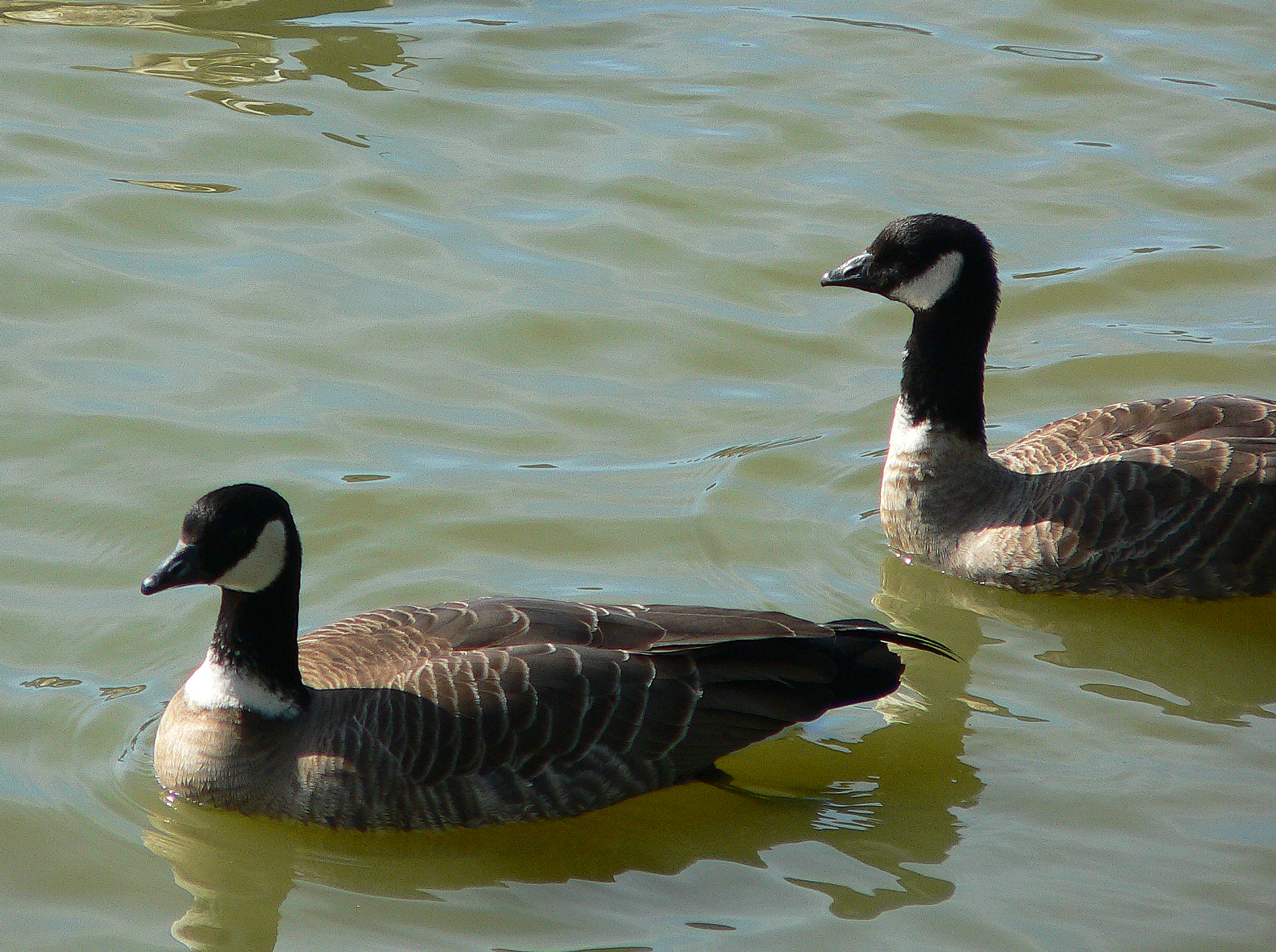 Aleutian Goose in Laguna Lake.